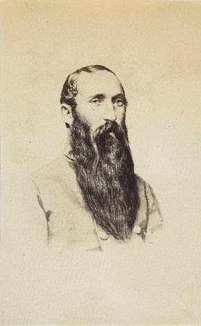 Brig. Gen. Albert Gallatin Jenkins, CSA, Albumen print